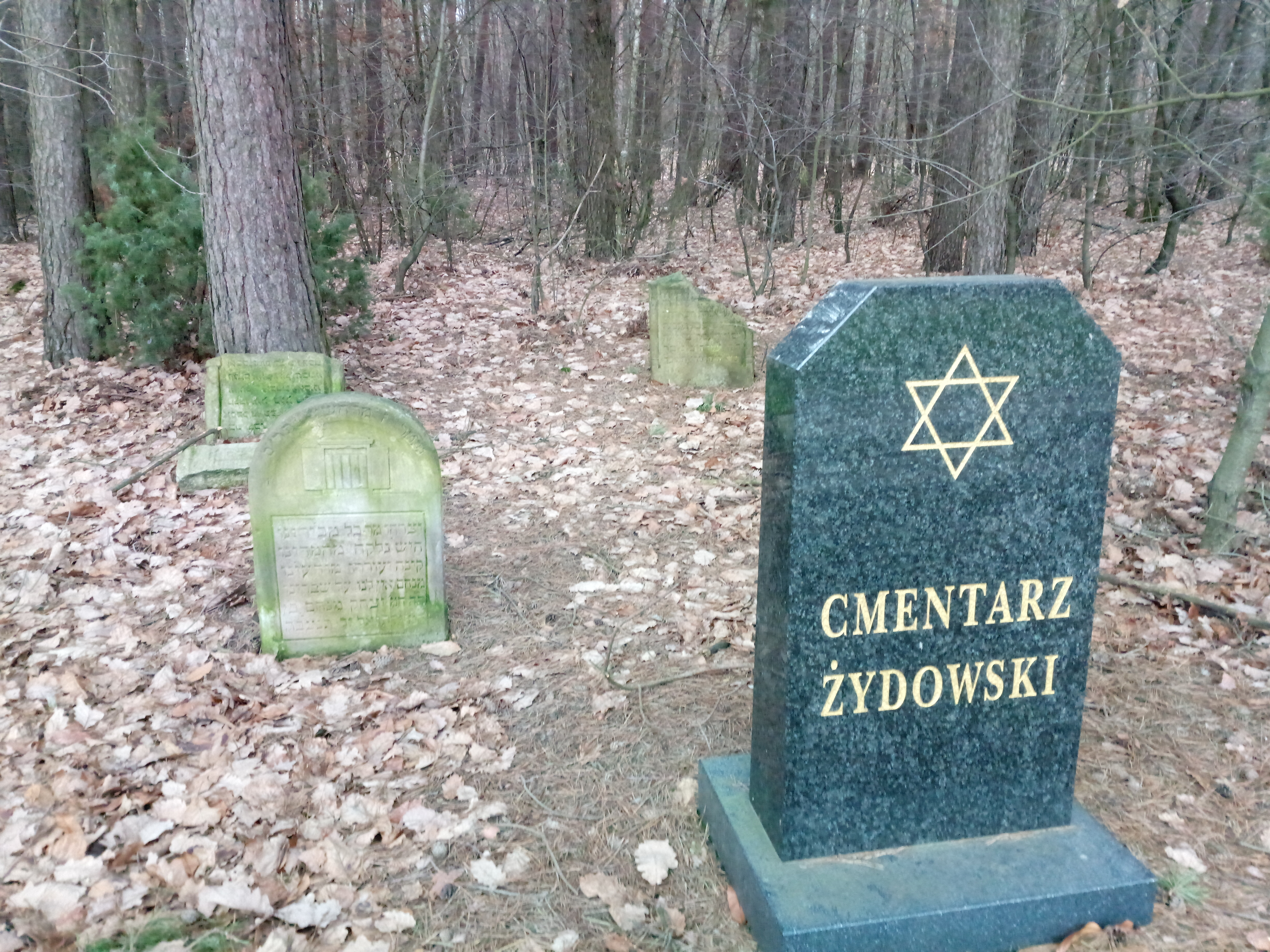 Jewisch Cmentary Michow Poland